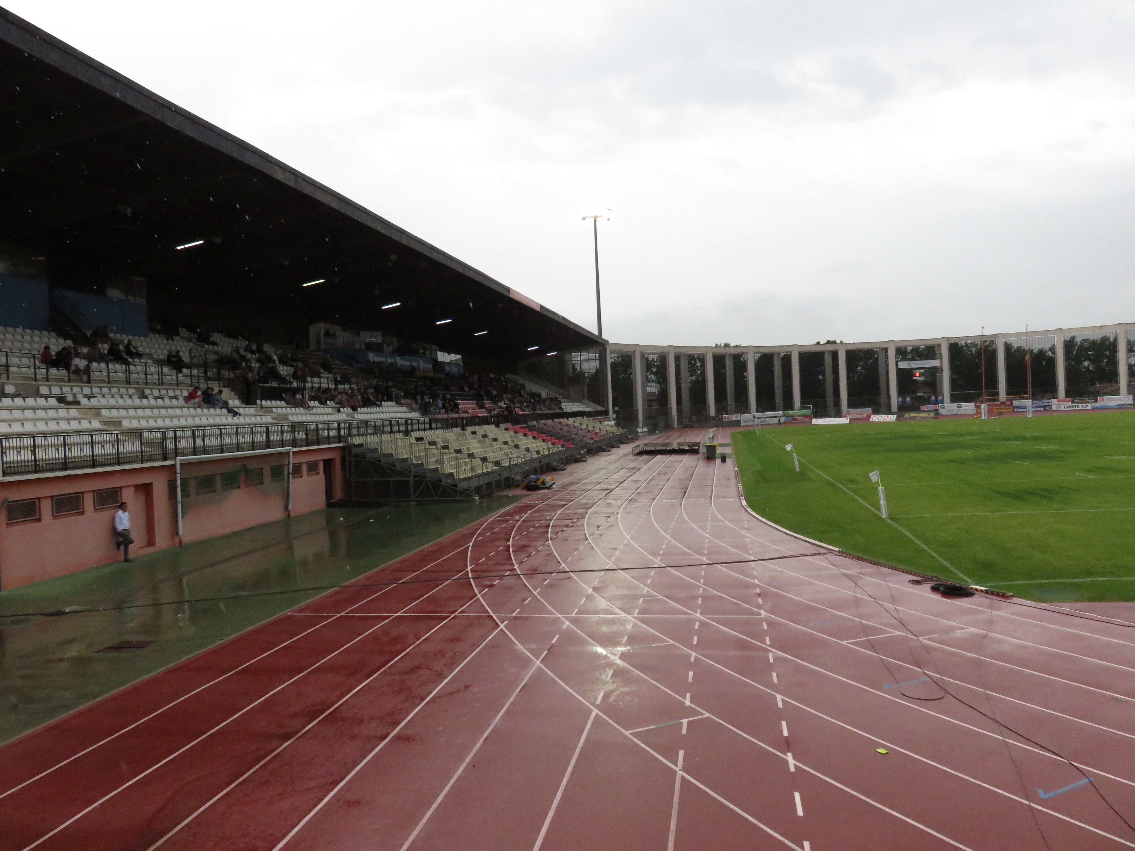 Finale du Championnat de France de rugby à XIII 2017